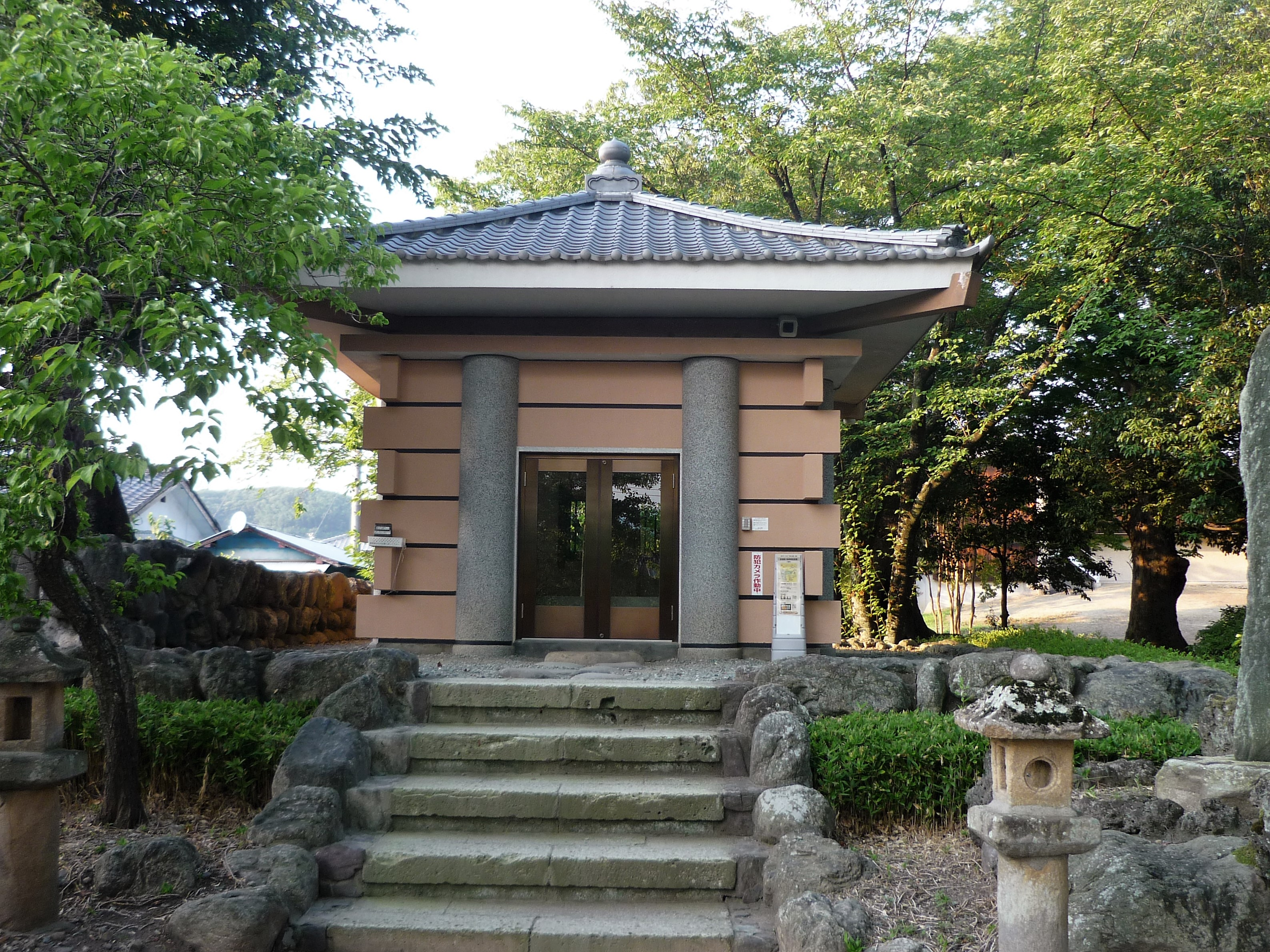 多胡碑の覆堂 Panasonic Lumix DMC-FS3